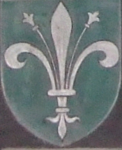 Wappen von Johannes Gropper - Propst des Cassius-Stiftes. Fundort: Bonner Münster